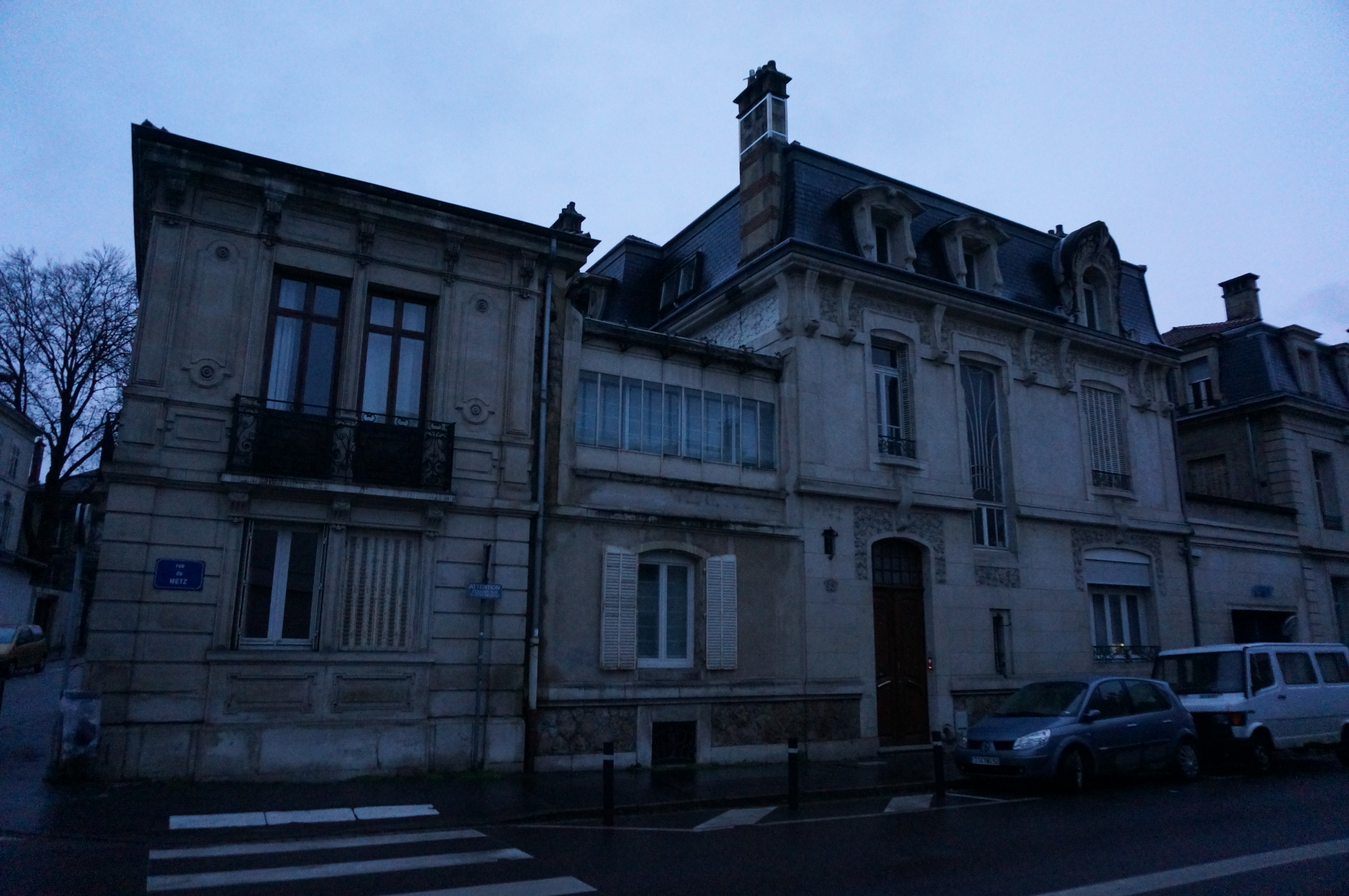 Maison Cavallier, 93 rue de Metz, Monument historique de Nancy.